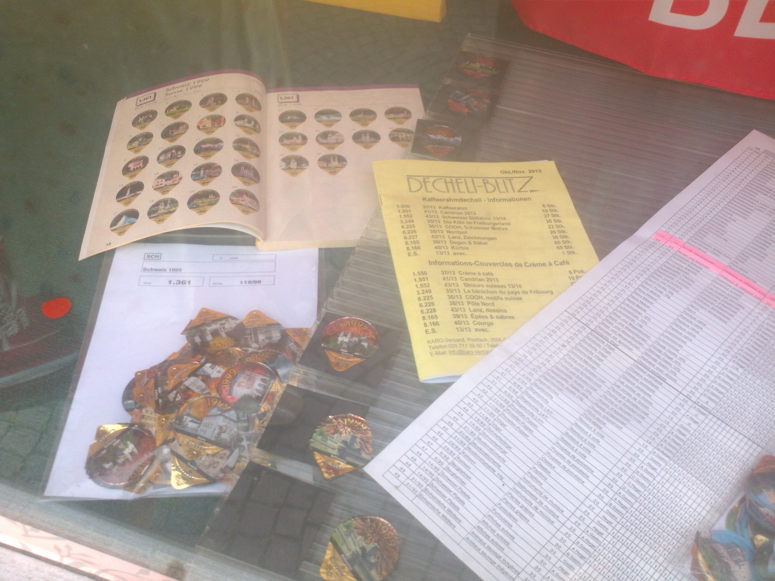 Schaufensterauslage eines Kaffeerahmdeckelsammelfachgeschäftes in Bellinzona.